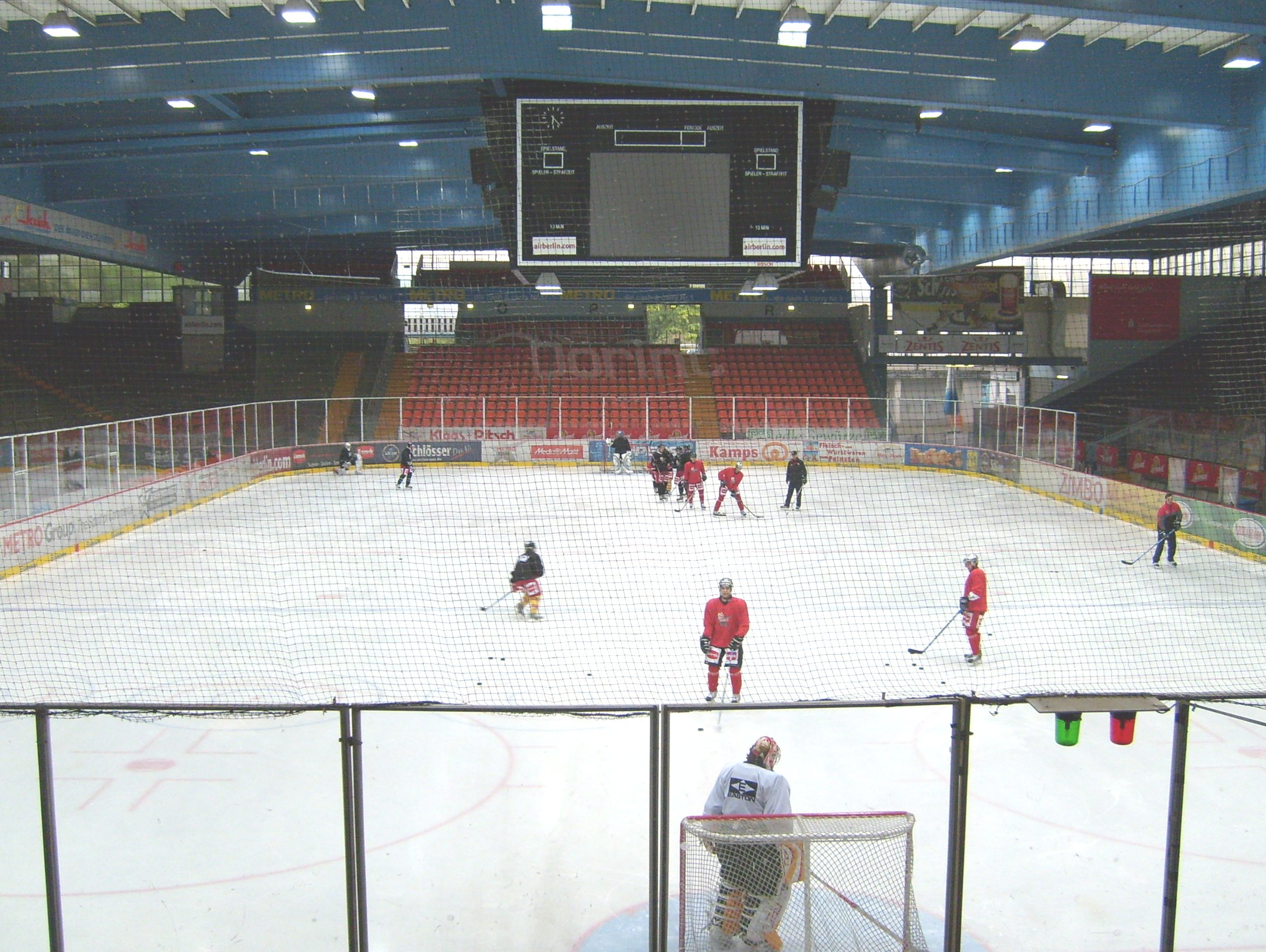 Eisstadion an der Brehmstraße - September 2007